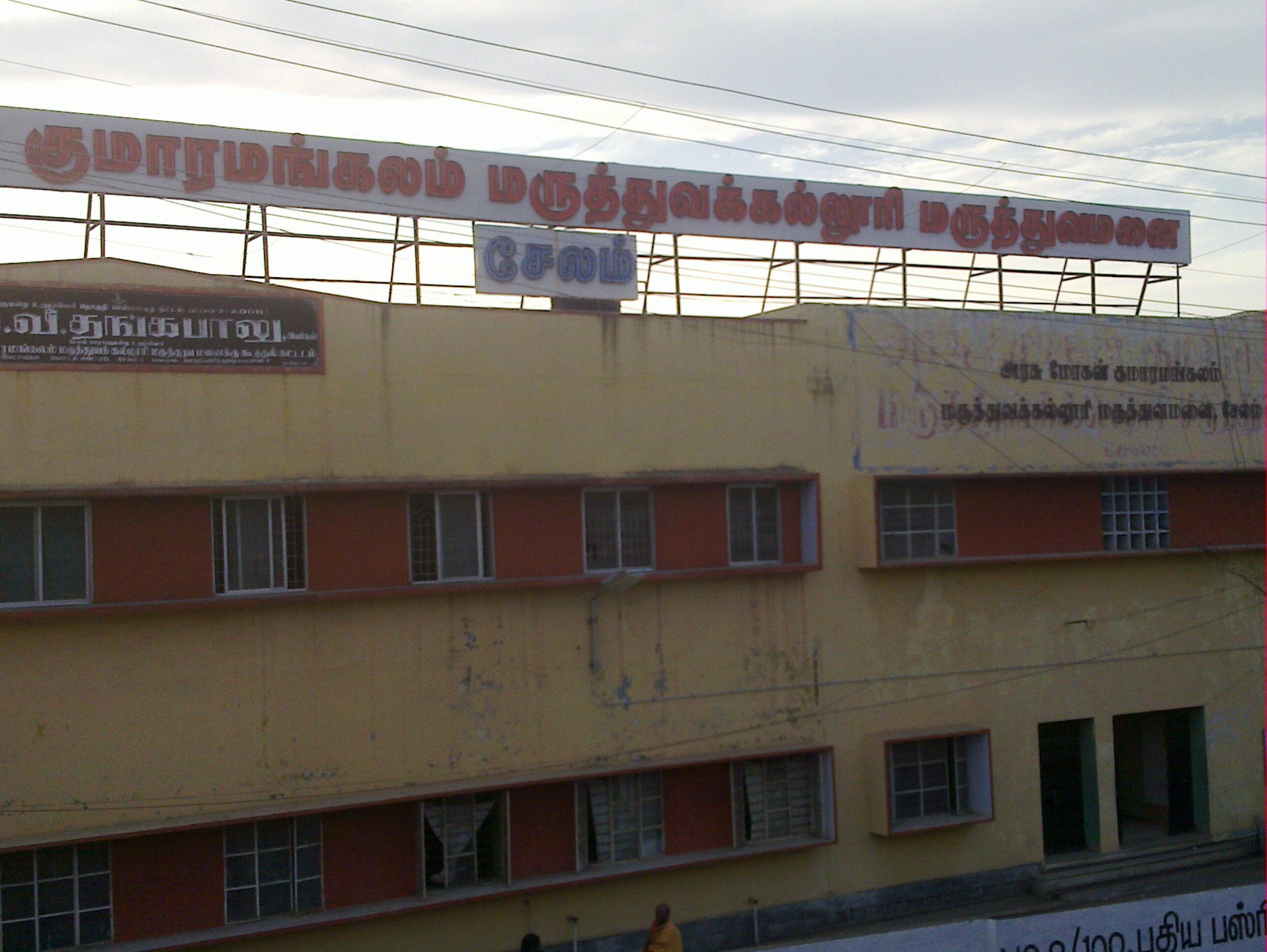 சேலம் மோகன் குமாரமங்கலம் பொது மருத்துவமனை